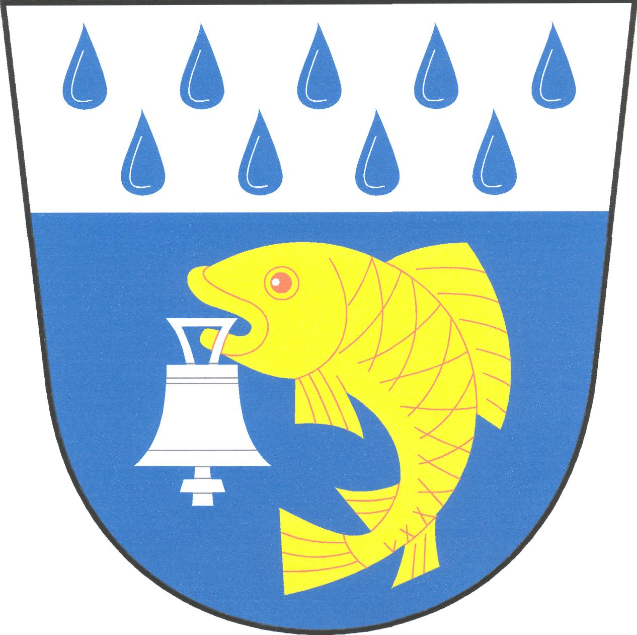 Znak obce Mokrouše